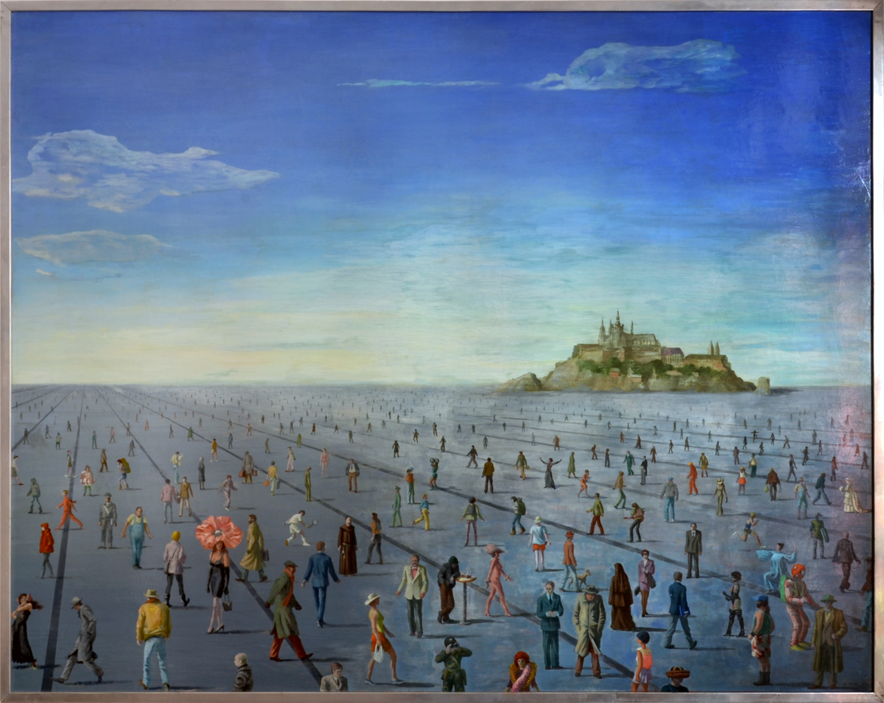 Milan Ressel, Vy a my (1996)